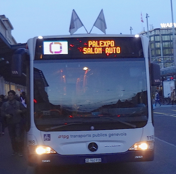 Navette mise sur pied par les Transports publics genevois (TPG) à l'occasion du Salon de l'automobile.